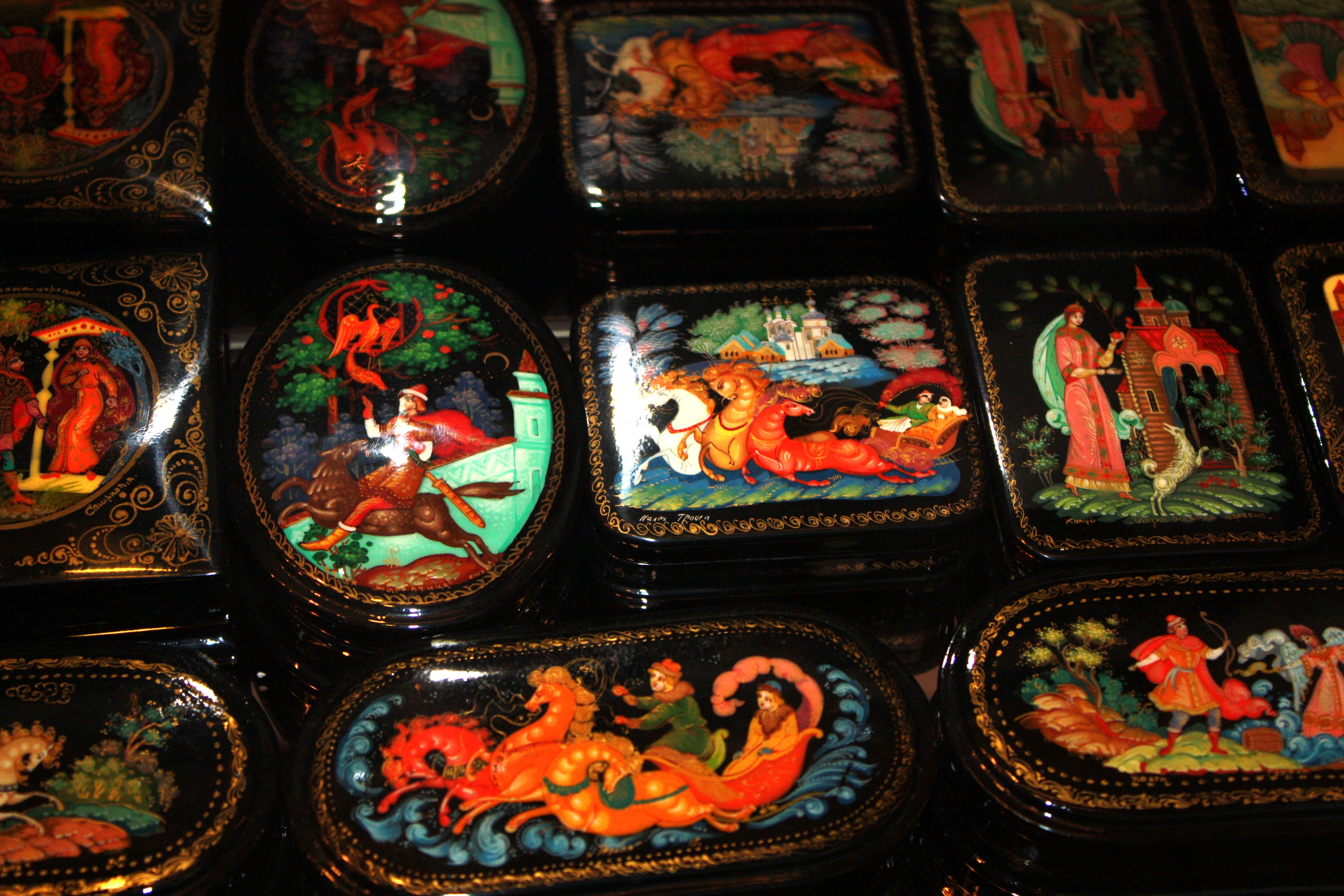 Russian lacquer art, Russische Lackminiaturen, Köln